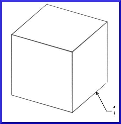 الضلع أ المراد رسمه